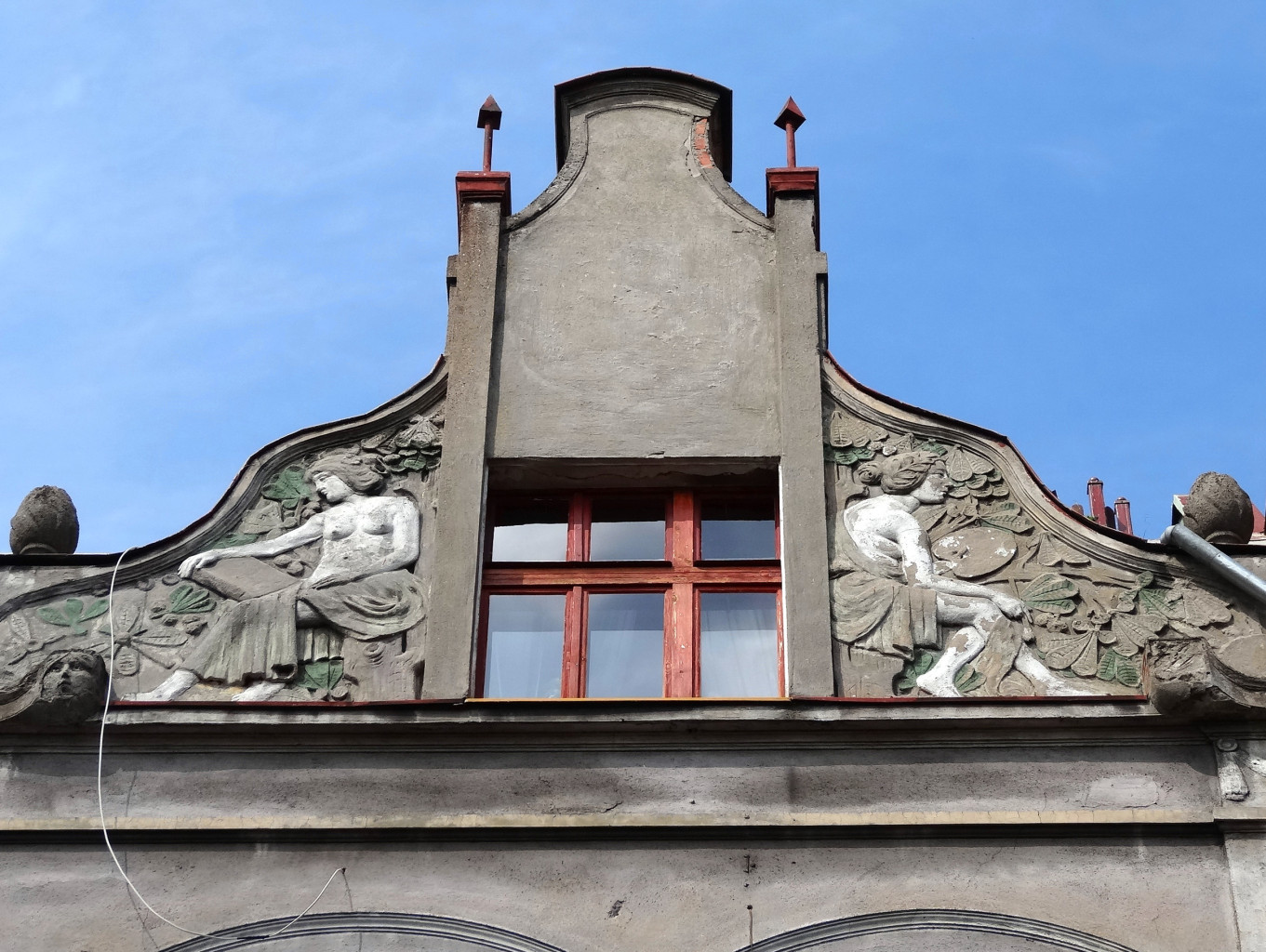 Kamienica przy ul. Długiej 17 w Bydgoszczy. Detal elewacji.